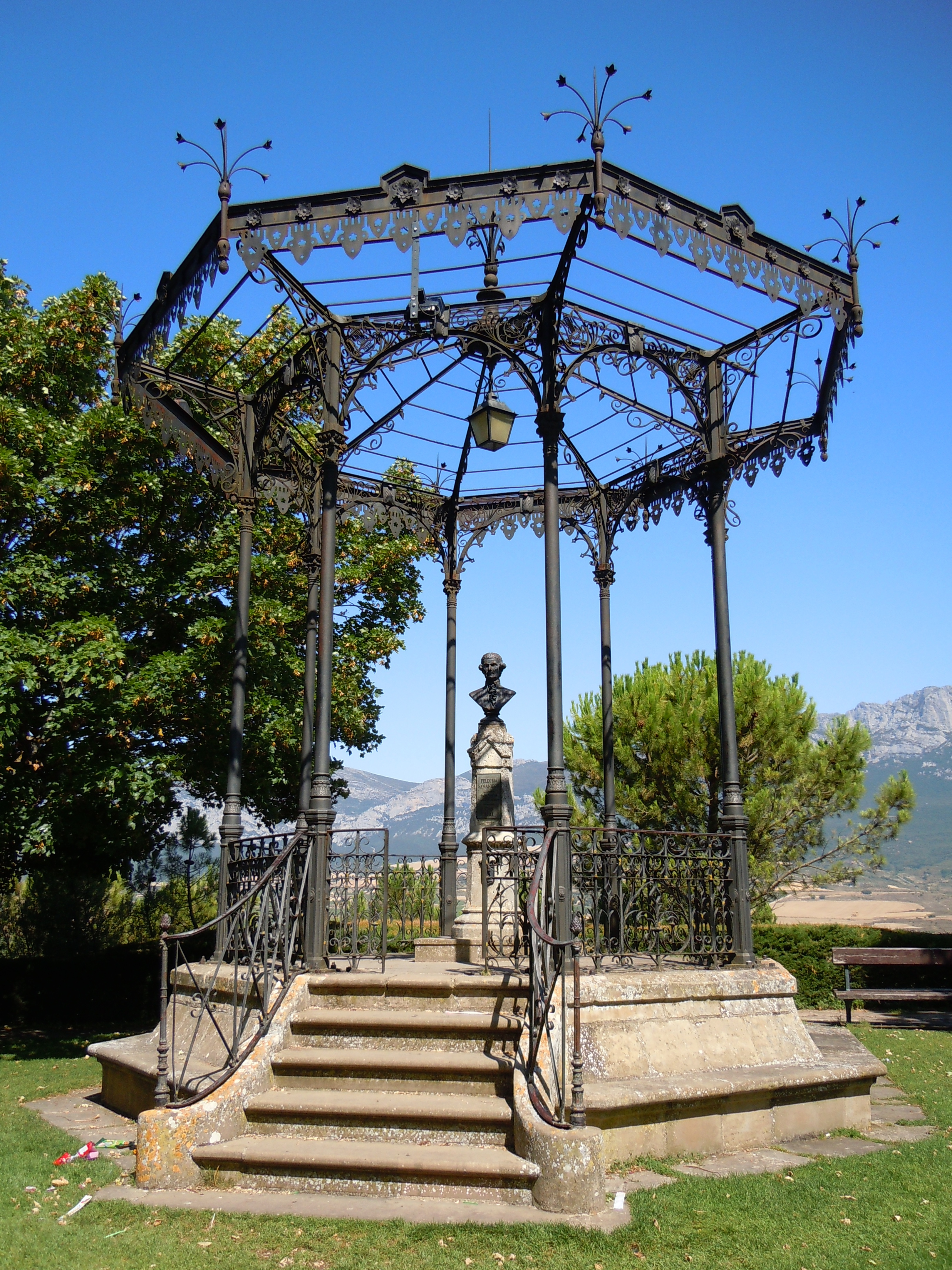 Monumento a Samaniego, Laguardia, Álava (Spain).